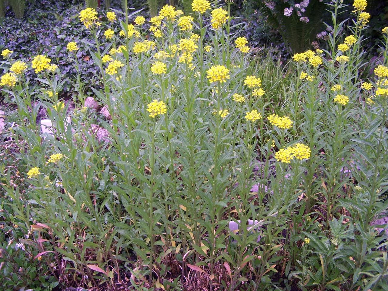 Erysimum pieninicum (pl. pszonak pieniński)